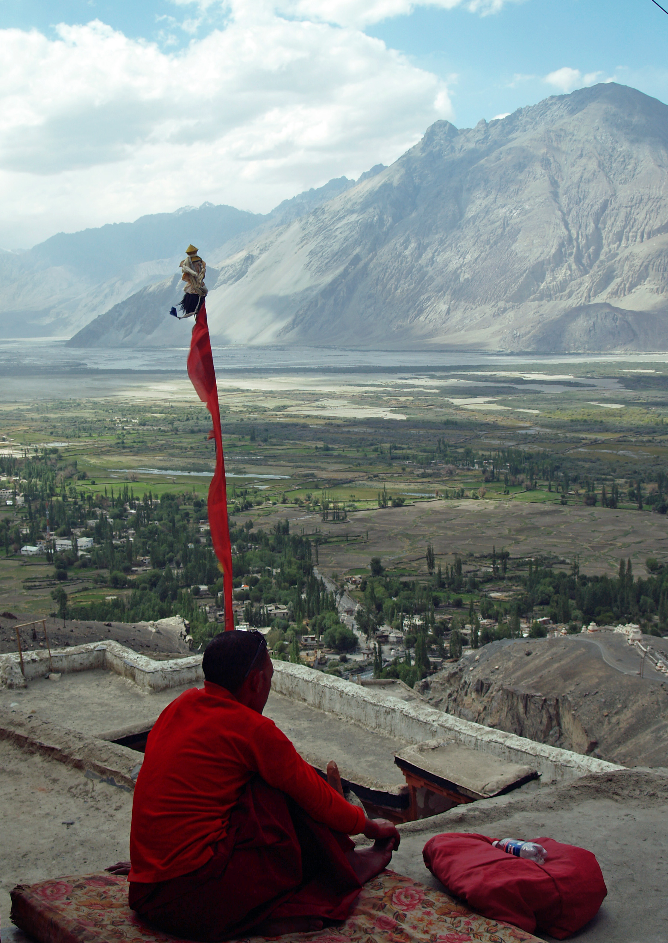 Monk at Diskit Gompa